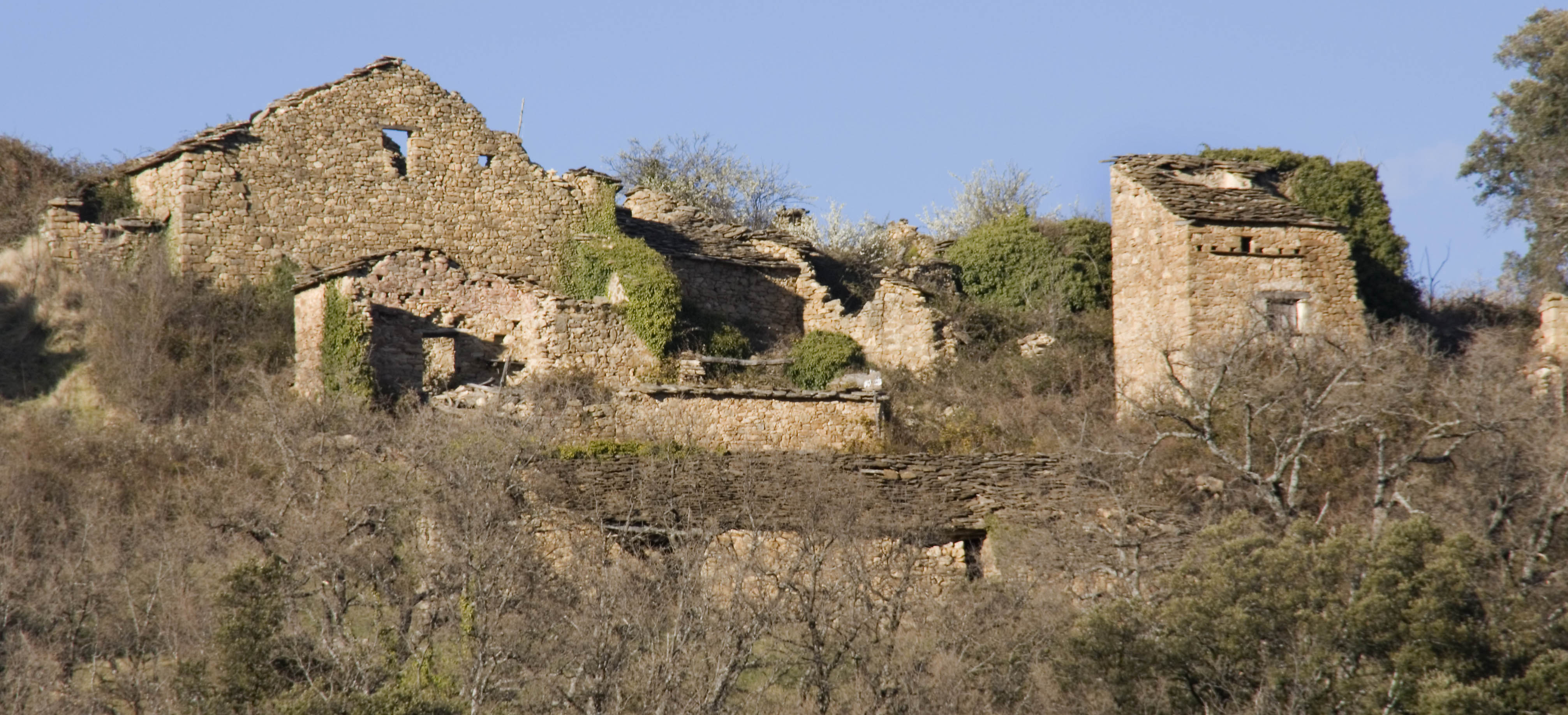 Rin de dalt (Rin de la Carrasca) Poble del municipi d'Isàvena, a la Ribagorça aragonesa. El poble està a la Serra del Jordal.